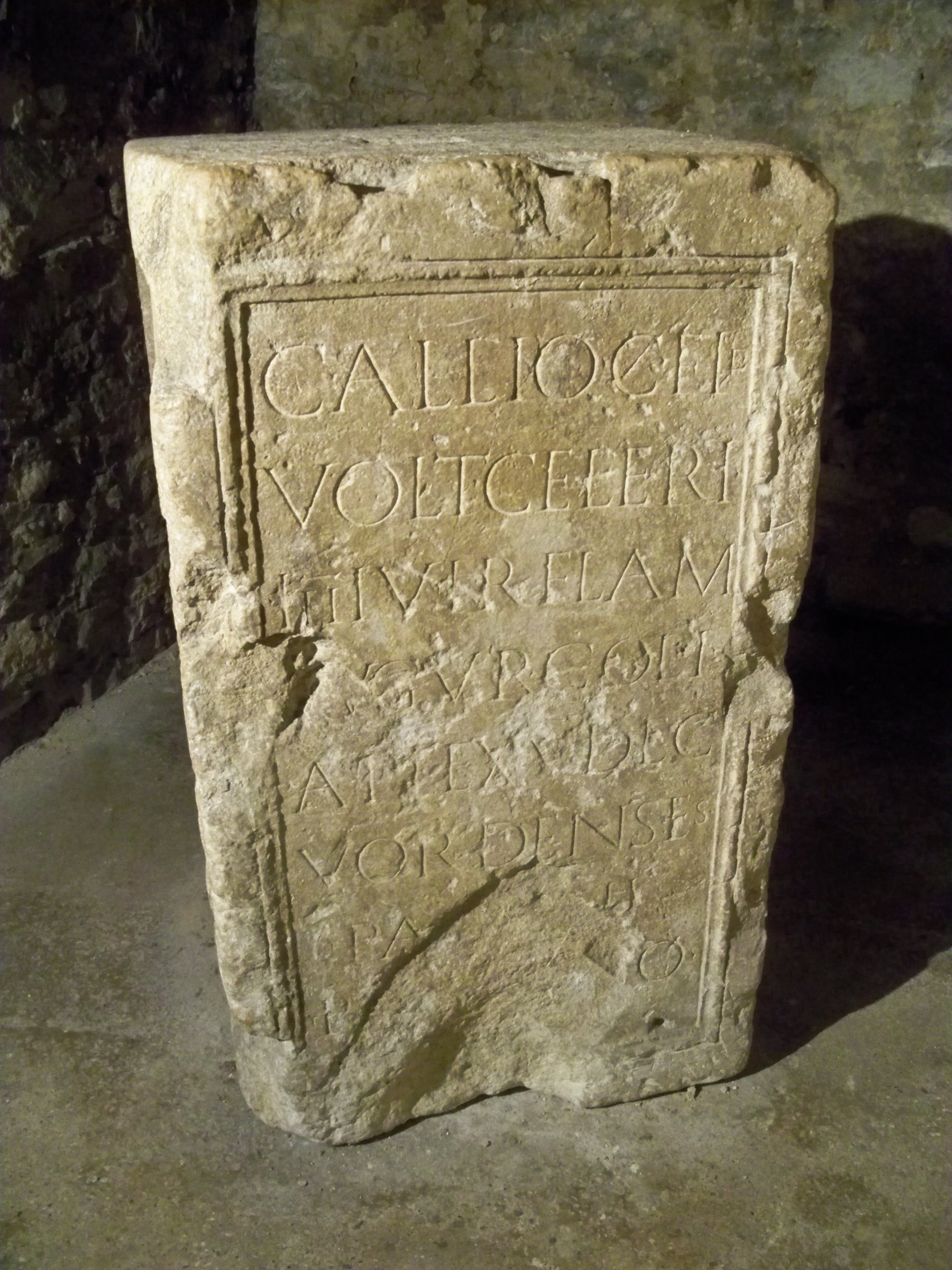 Pierre taillée dans la seconde crytpe de la Cathédrale Sainte Anne d'Apt, Vaucluse, France. Inscription latine d'époque romaine. Base de statue élevée en l'honneur du notable Caius Allius Celer, quattuorvir, flamine et augure de la colonie d'Apt, inscrit parmi les juges des cinq décuries, patron du pagus des Vordenses, le monument a été réalisé par le pagus. Références: CIL XII, 1114 (ILS 6989) ; ILN Apt, 22